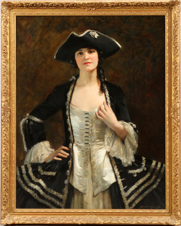 Painting by Albert Henry Collings